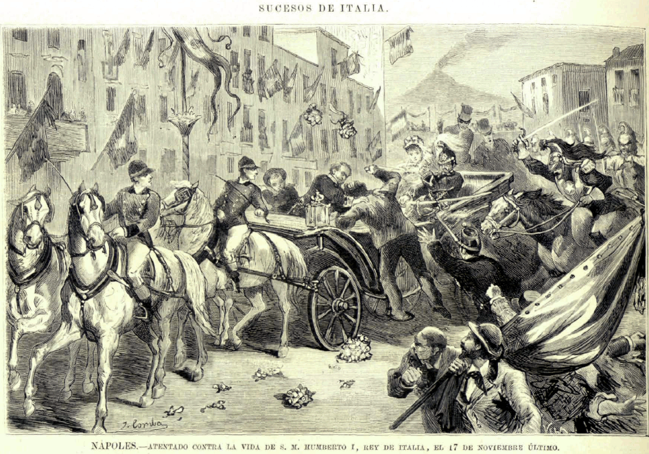 Imagem do atentado de Passannante ao Rei Umberto I retirada de um jornal da época.